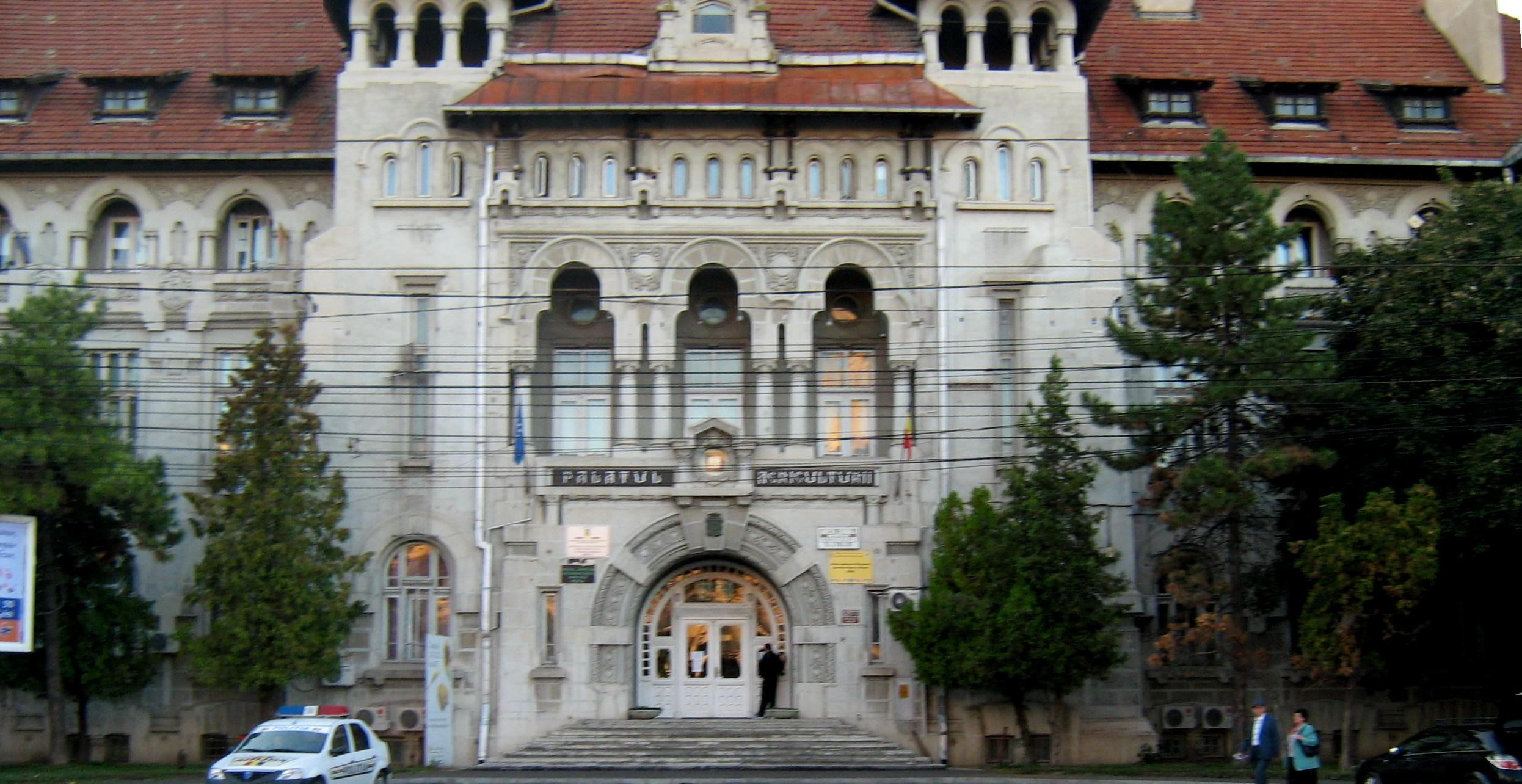 Palatul Agriculturii